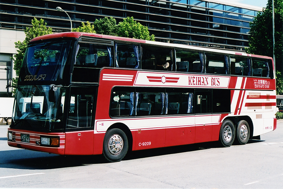 京阪バス グランパノラマ C-9209 三菱ふそう・エアロキング U-MU525TA改